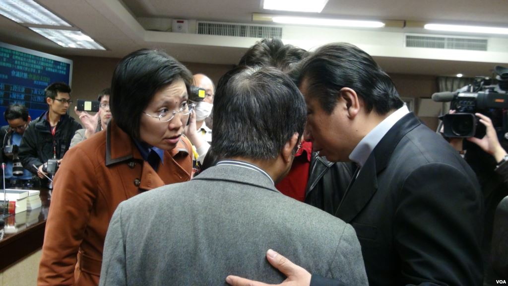 中國國民黨籍立委正在商討對策。